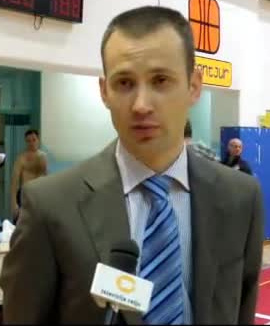 Gašper Potočnik